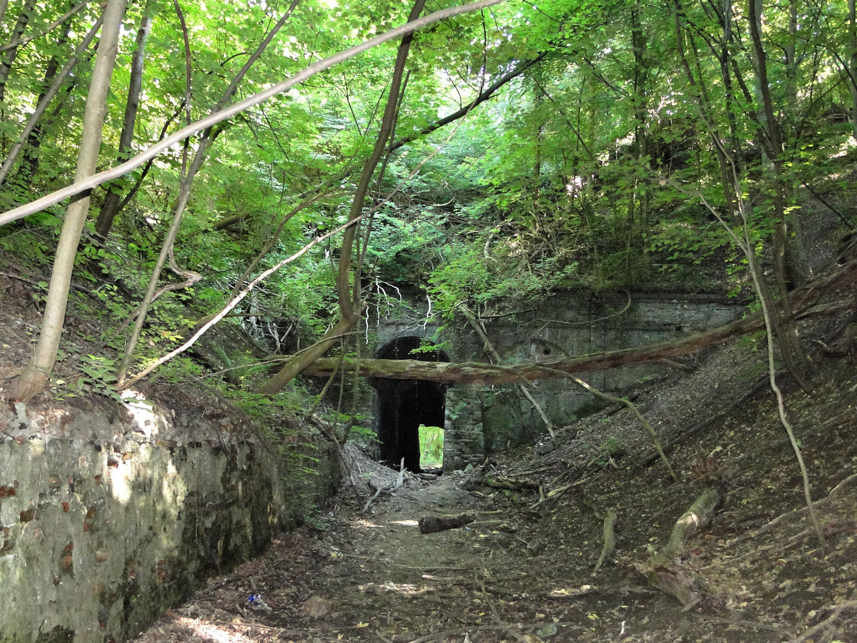 Tunel transportowy dawnej kopalni kredy w Szczecinie Zdrojach